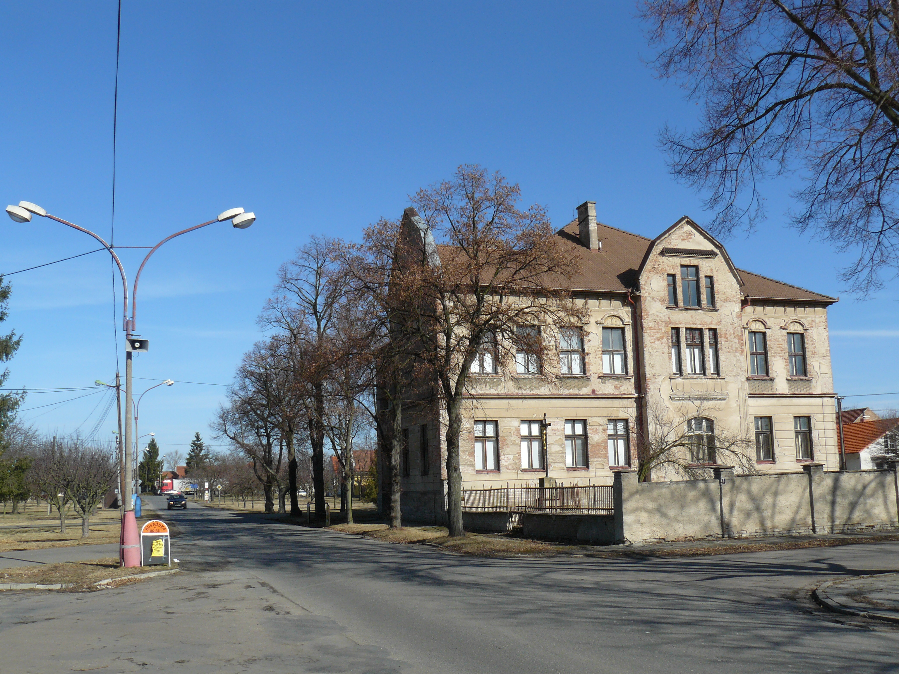 Odřepsy